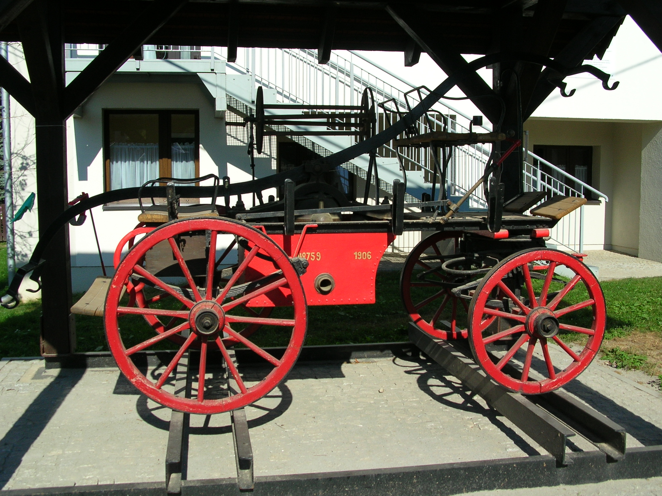 Pompa strażacka z 1906 r. przed OSP w Kluczu.